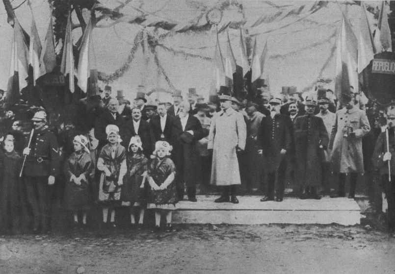 LPDF N°228 page14 Thionville Pétain le maire Maud'huy sur l'estrade.